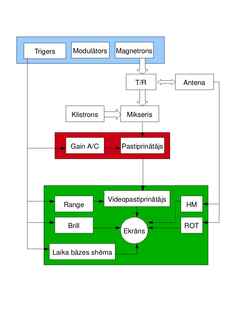 Radara blokshēma. Zilais kvadrāts ir raidītājs, sarkanais - uztvērējs, zaļais - displejs